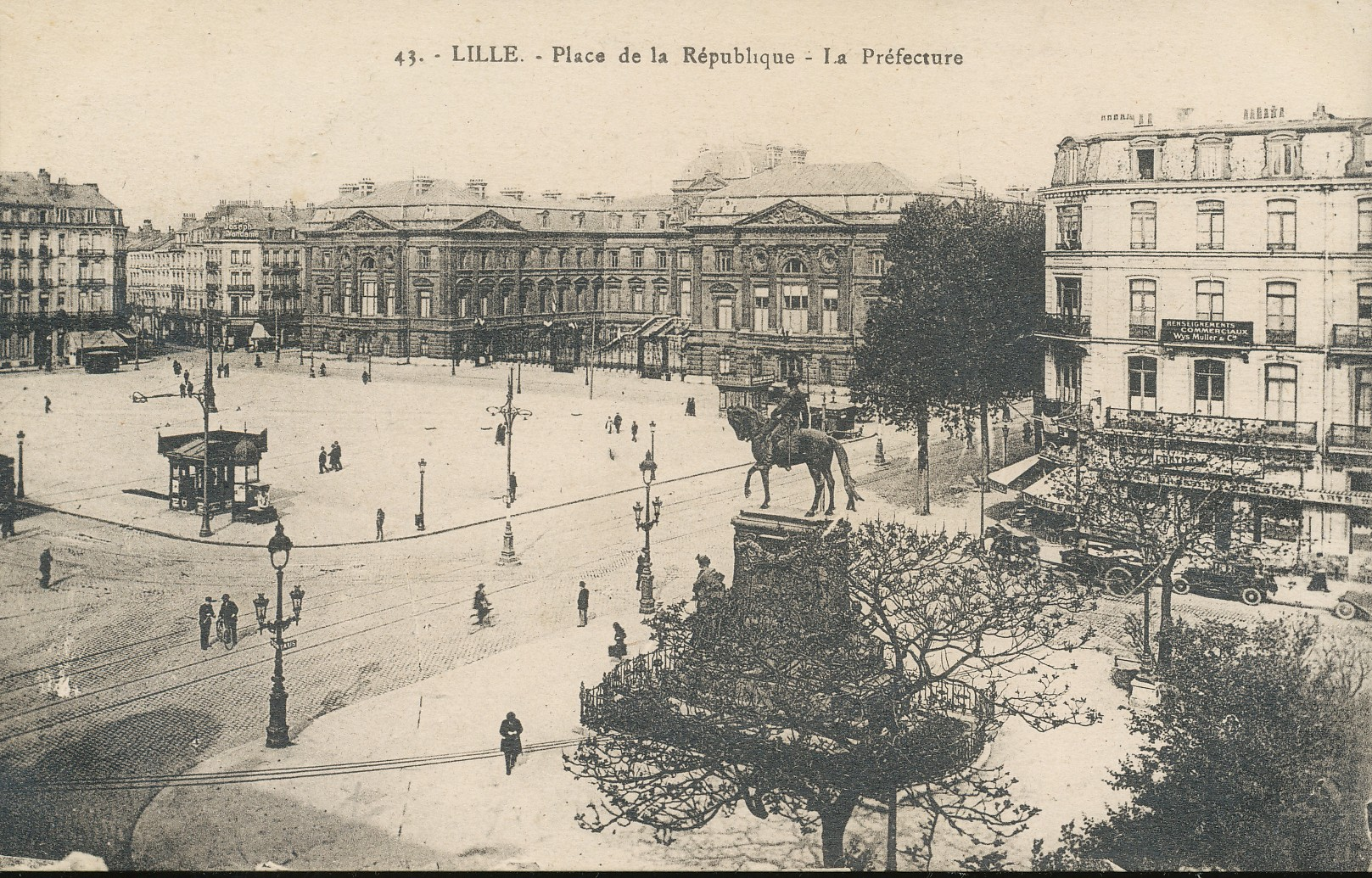 Lille - 43 - Place de la République - La Prefecture